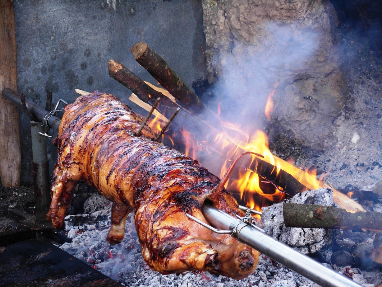 Pečeno prase na ražnju. Badnji dan 2011. godine u Mrkonjić Gradu.